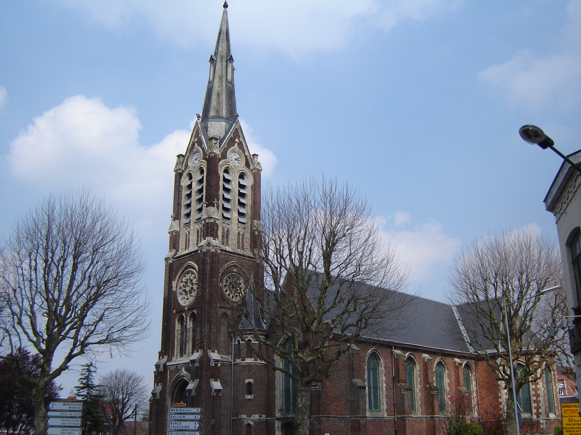 Eglise Saint-Martin in Bousbecque, Nord, Nord-Pas-de-Calais, France.